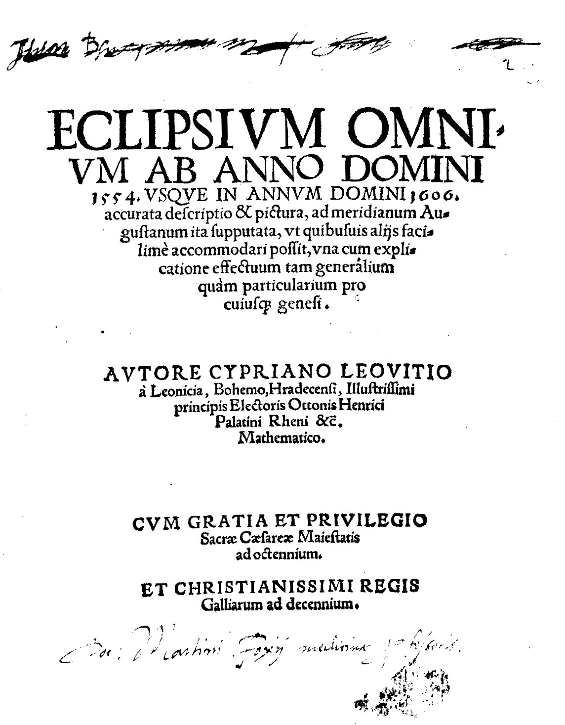 Frontespizio